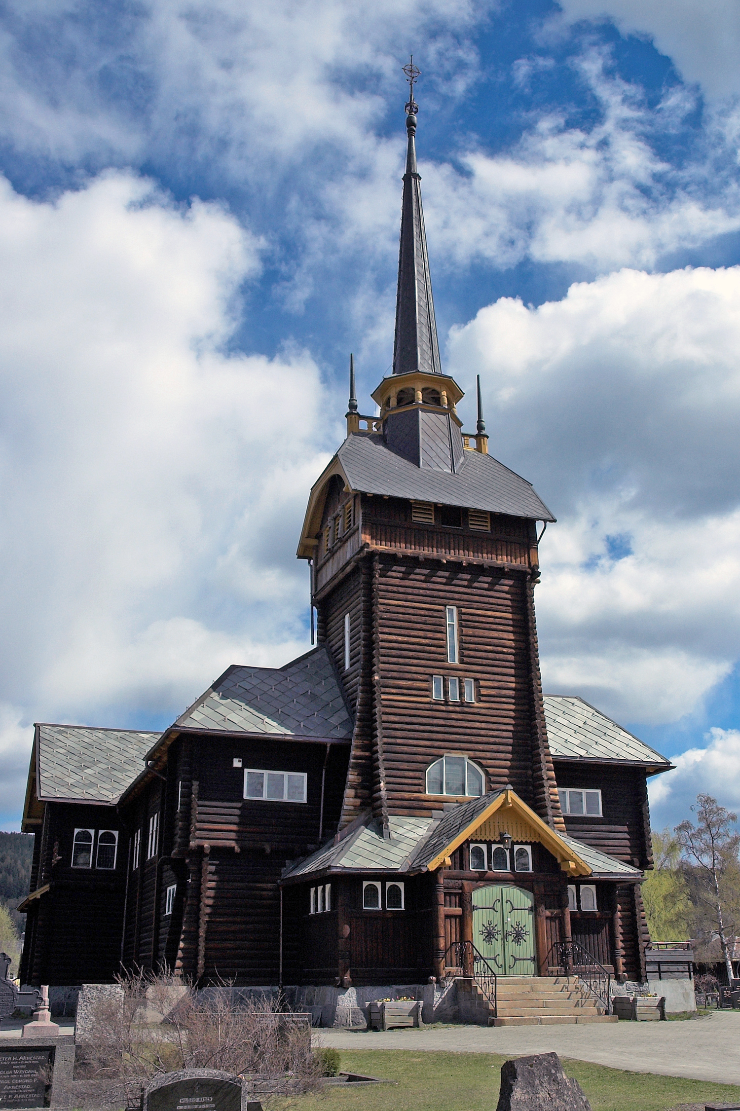 Åmot kirke, Åmot church, Rena